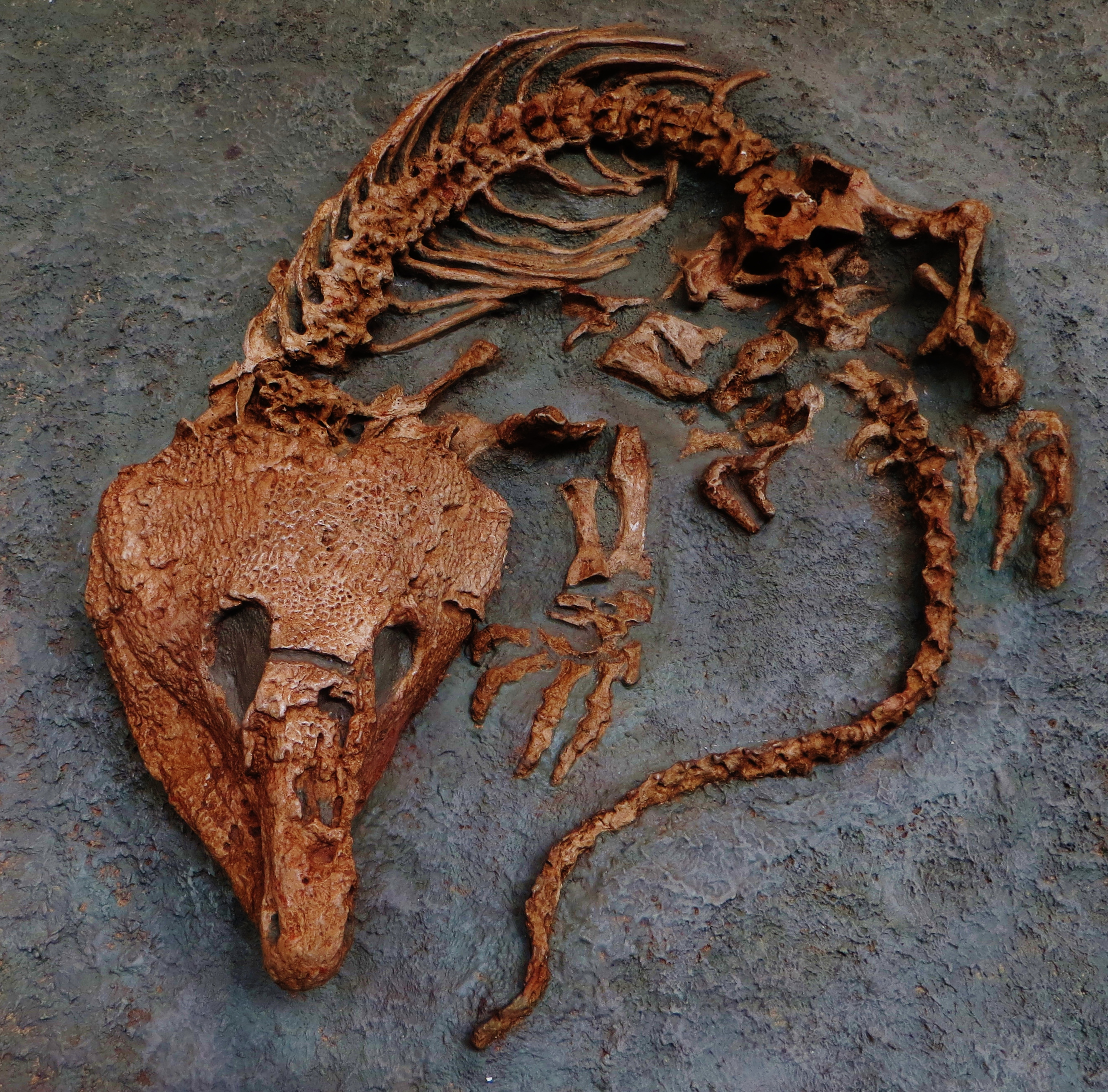 Fossil of Labidosaurus, an extinct reptile- Took the photo at Musee d'Histoire Naturelle, Paris